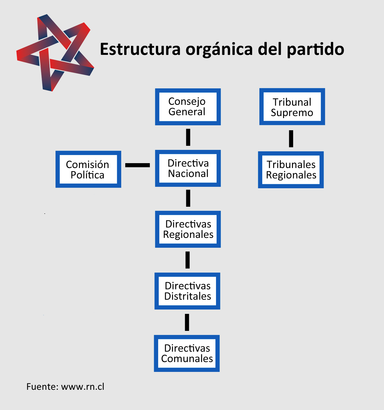 Organigrama que muestra la estructura organizativa de Renovación Nacional.